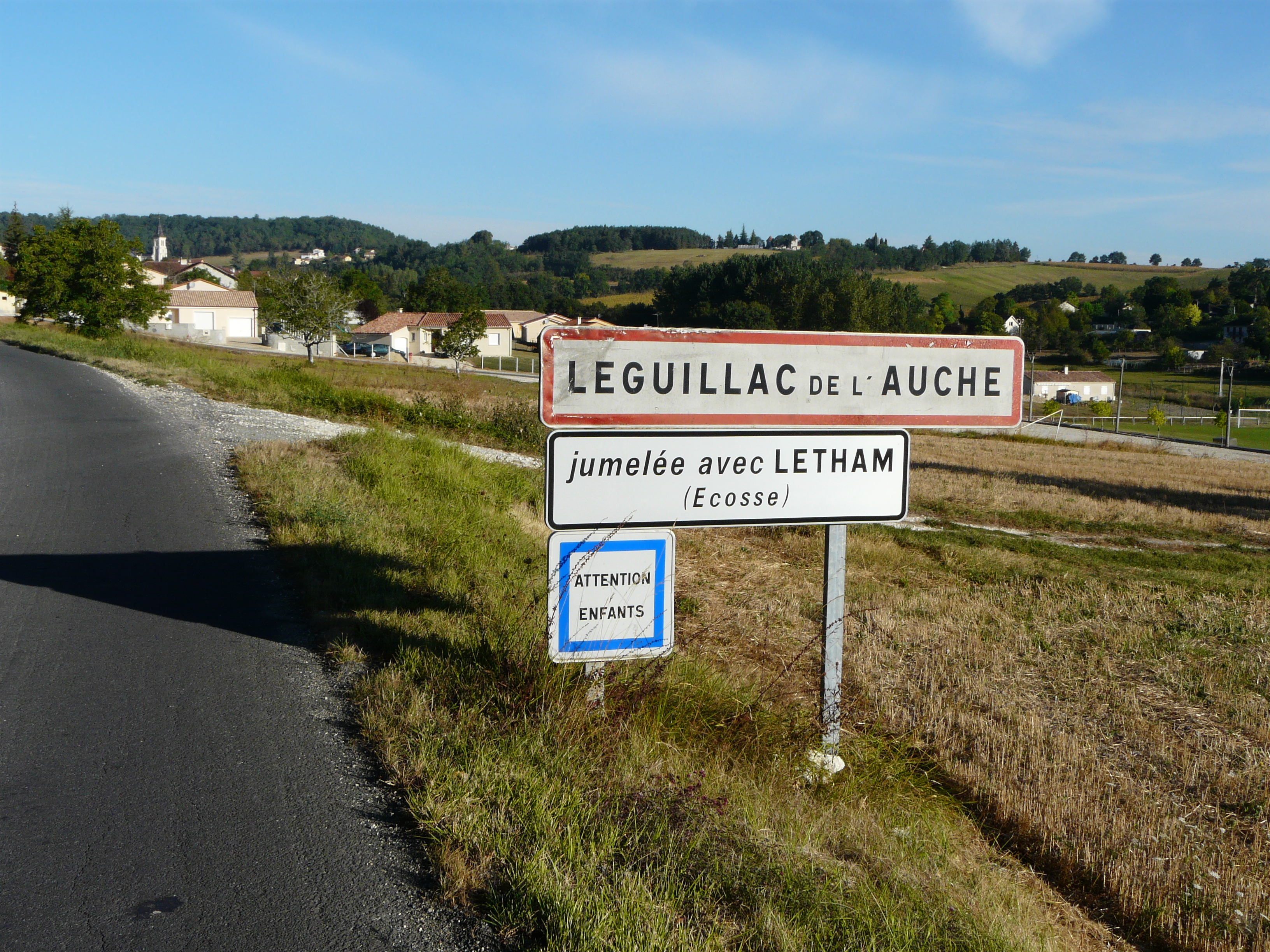 Panneau de jumelage de Léguillac-de-l'Auche, Dordogne, France.